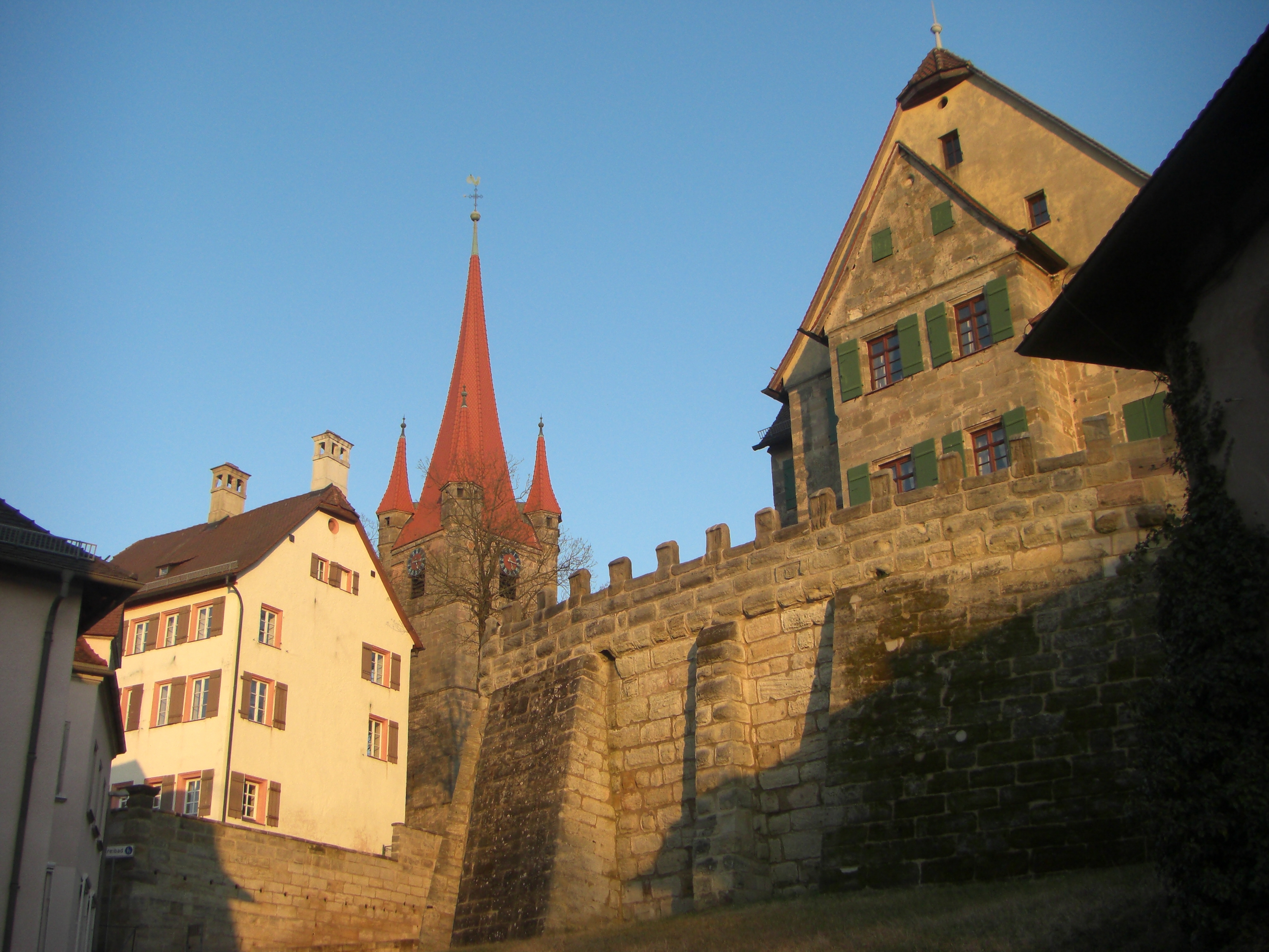 Ensemble Oberer Markt - Weisses und Grünes Schloss von Südwest, Heroldsberg, Landkreis Erlangen-Höchstadt, Mittelfranken, Bayern, Deutschland